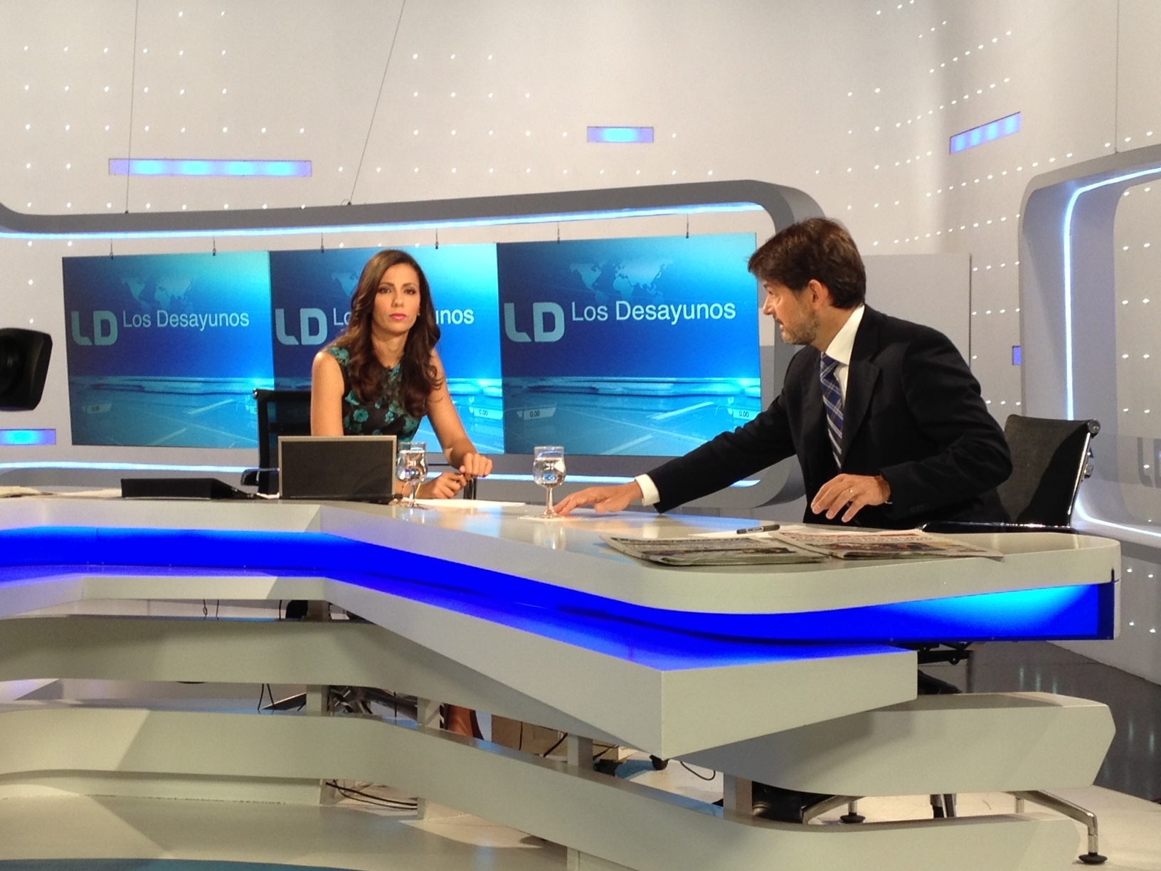 Oriol Pujol durant l'entrevista al programa "Los Desayunos" de TVE amb Ana Pastor